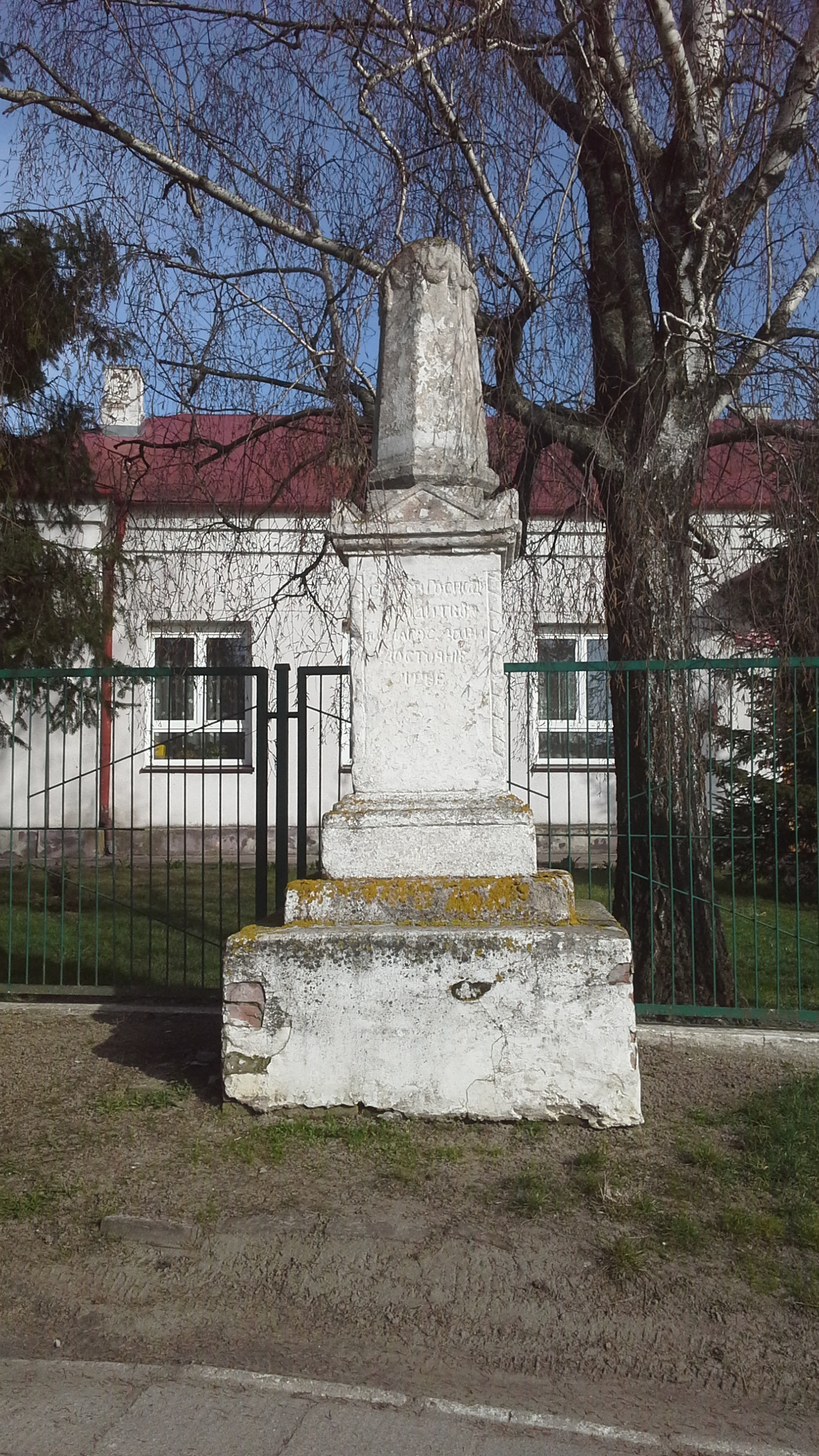 Dziekanów. Prawosławny obelisk przy szkole